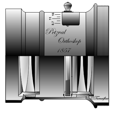 Petzval-féle ortoszkóp